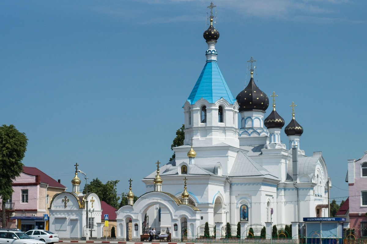 Паставы. Царква